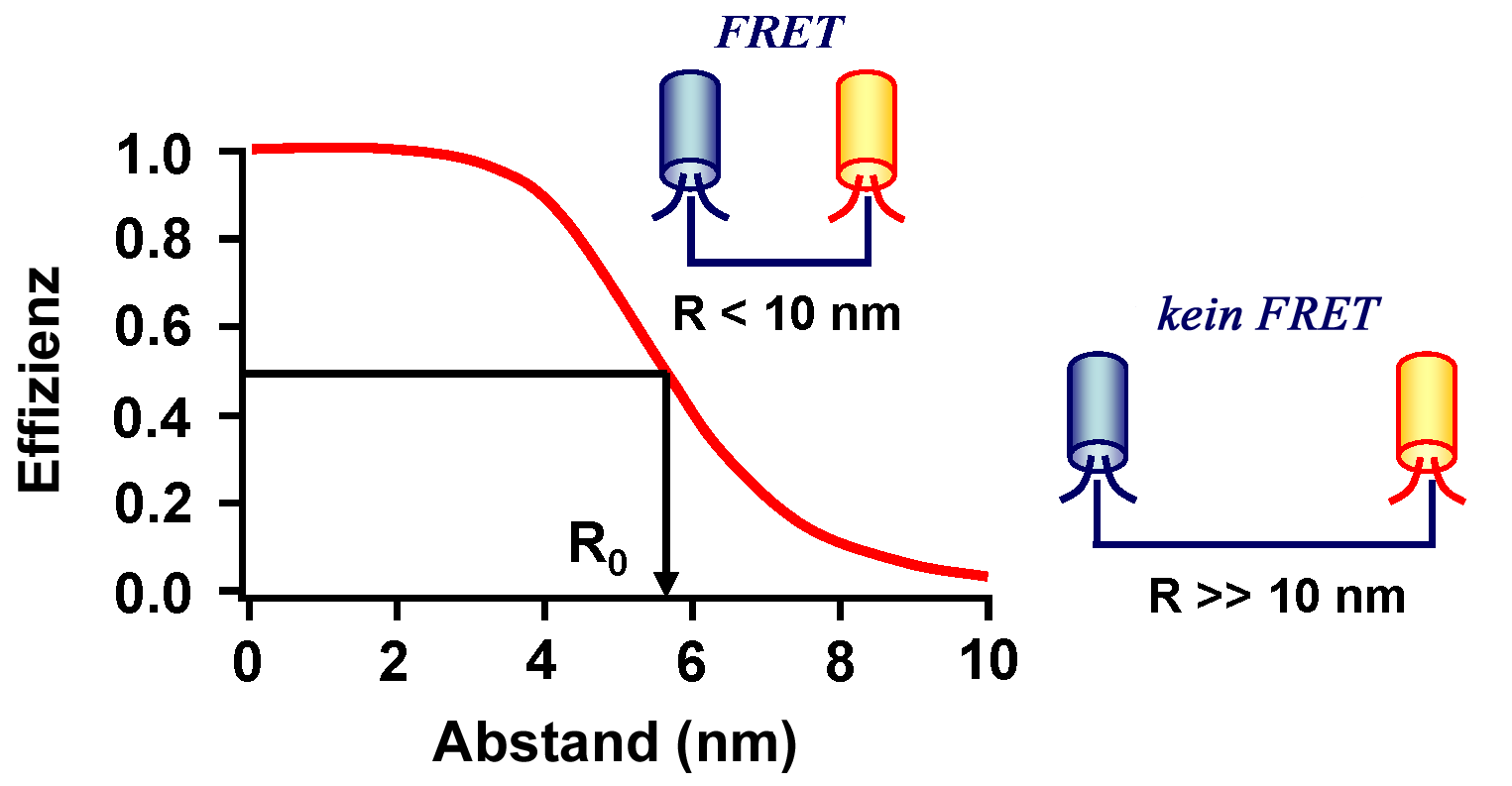 Voraussetzungen für einen Förster-Resonanzenergietransfer. Abstand unter 10 nm.